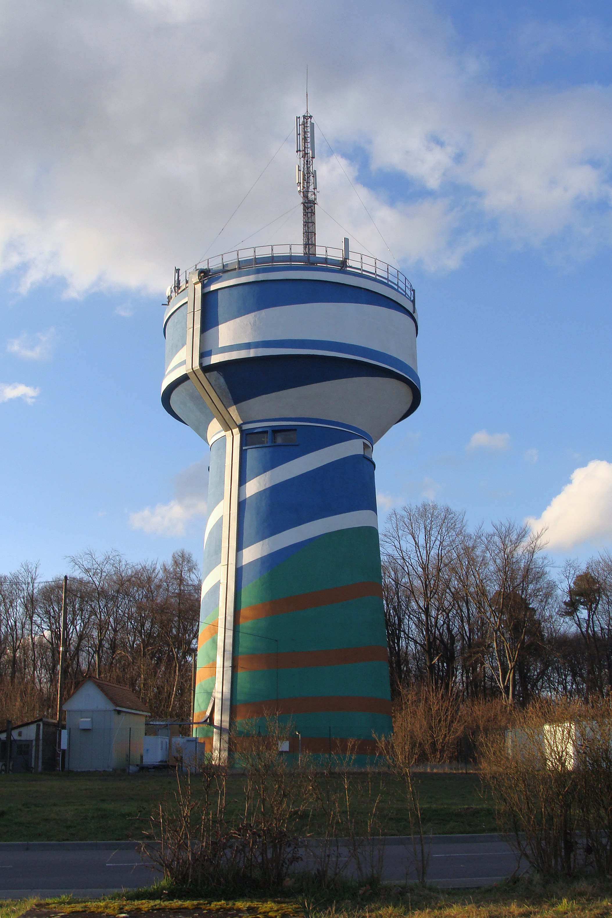 Château d'eau de la ville de L'Hôpital (Moselle) situé rue du général Irwin. Photo prise le 17 février 2014.